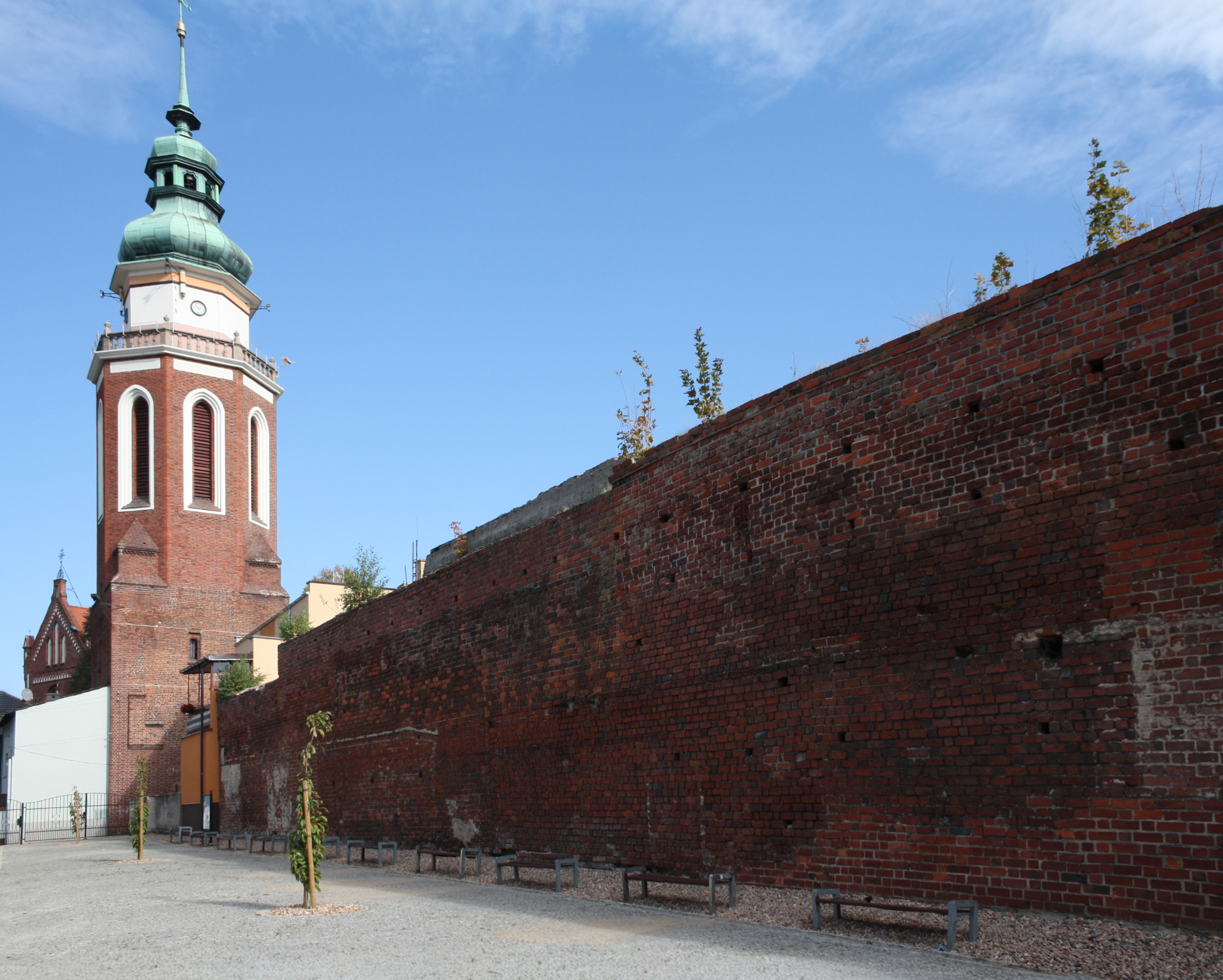 Syców, zespół murów obronnych, XIV, XV, 1578